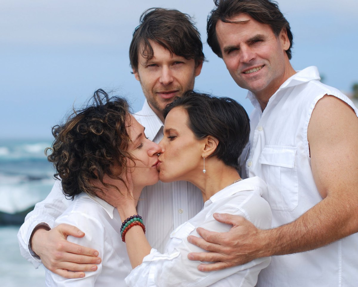 Homosexual group marriage